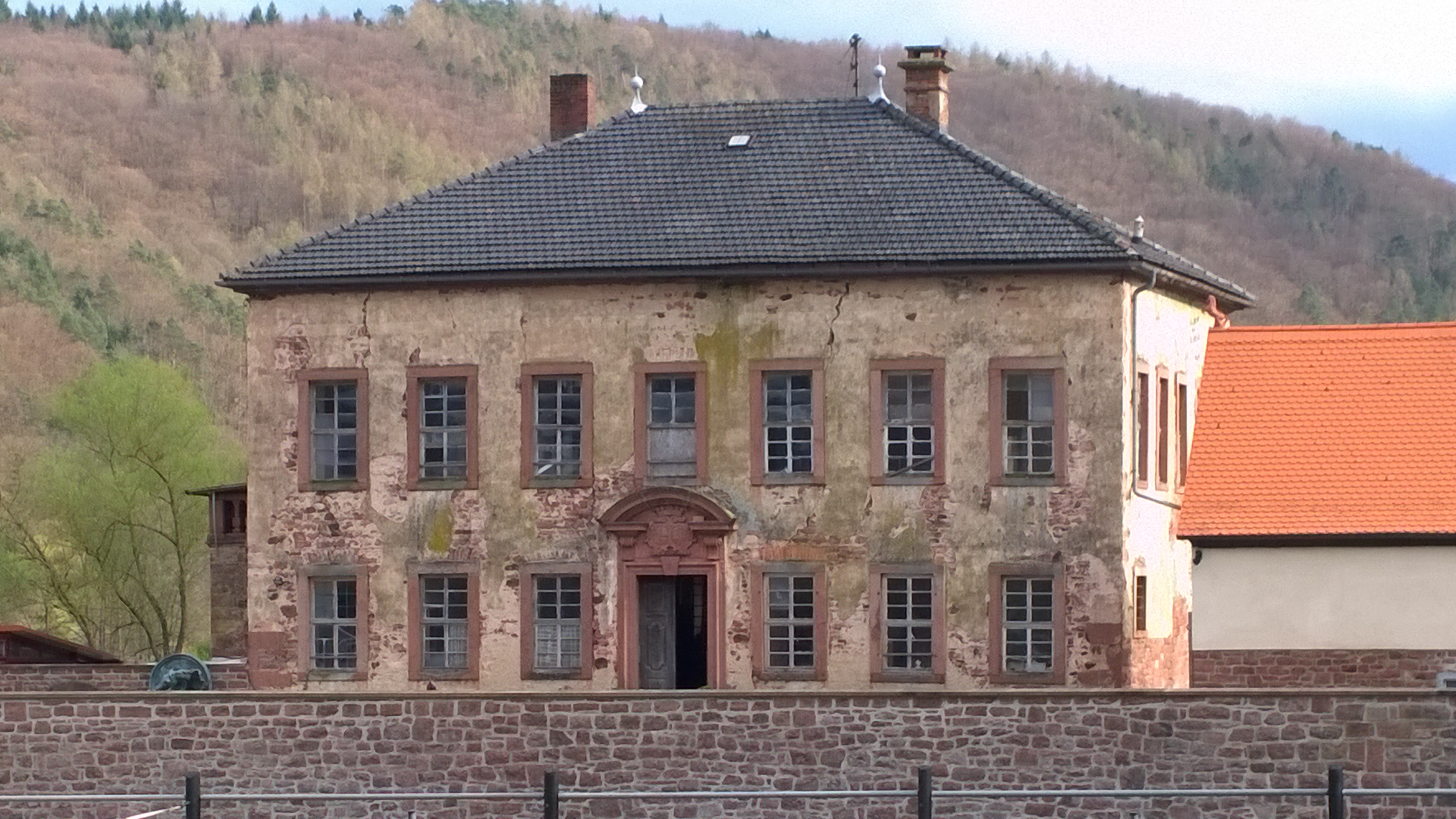 Schloss Rodenbach: Lohr am Main - Rodenbach, ehemaliges Schloss, seitliche Vorderansicht